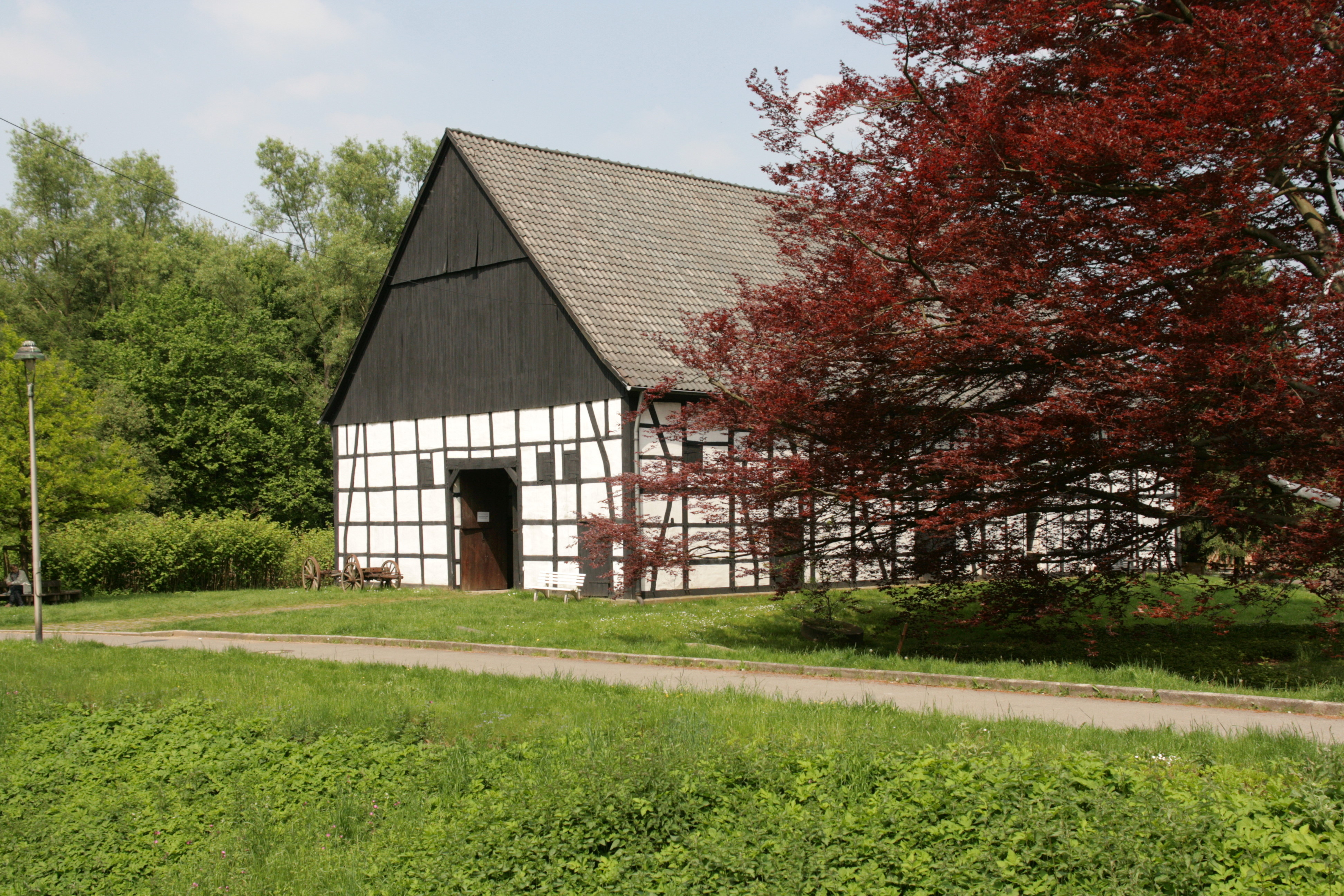 Bauernhausmuseum Hattingen, An der Kemnade 10 in Hattingen-Blankenstein